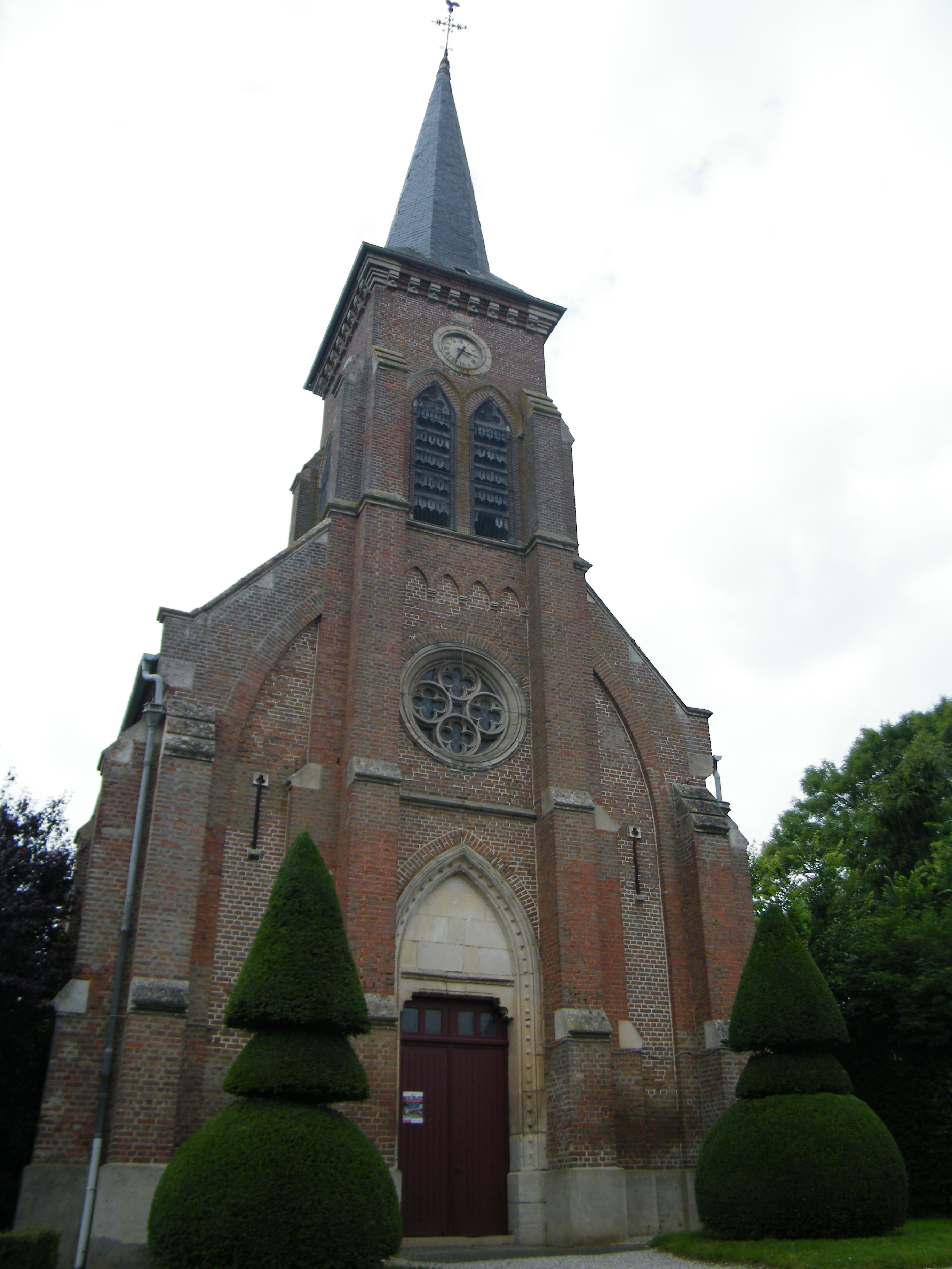 Vue du clocher.